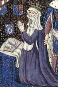 Blanche de Navarre